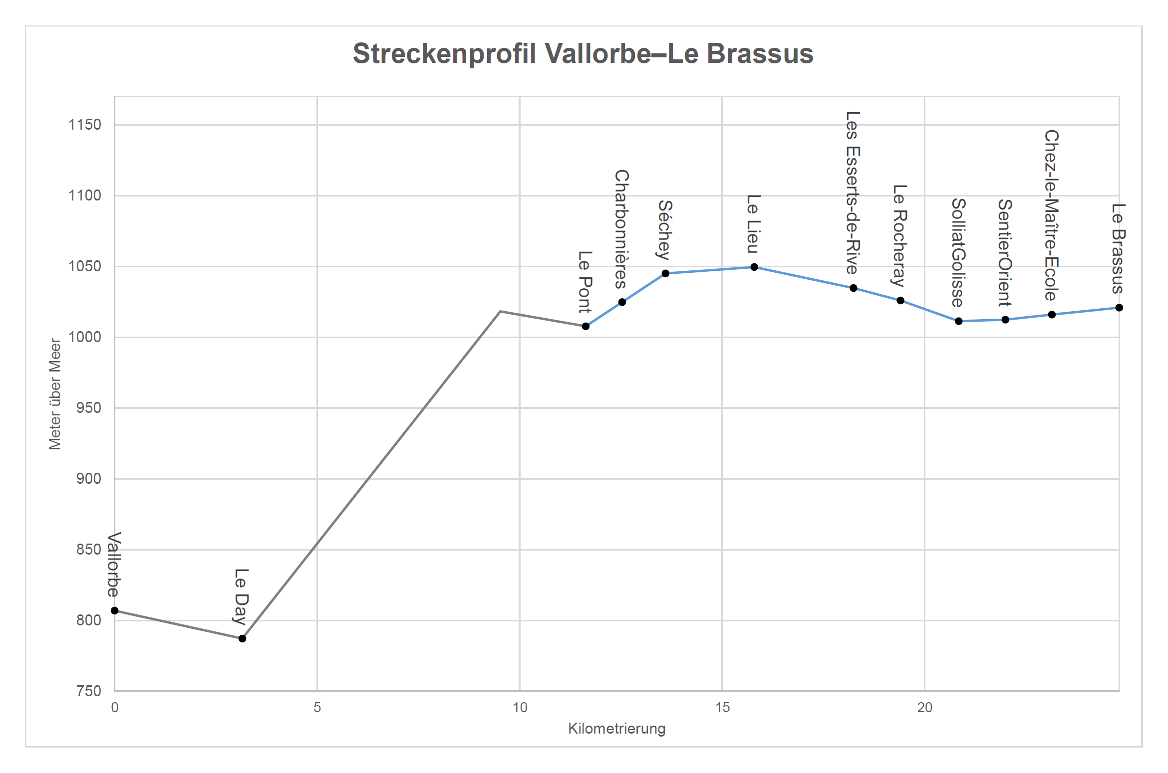 Streckenprofil der Bahnstrecke Vallorbe–Le Brassus grau: Streckenabschnitt im Eigentum der Schweizerischen Bundesbahnen (SBB) blau: Abschnitt von TRAVYS